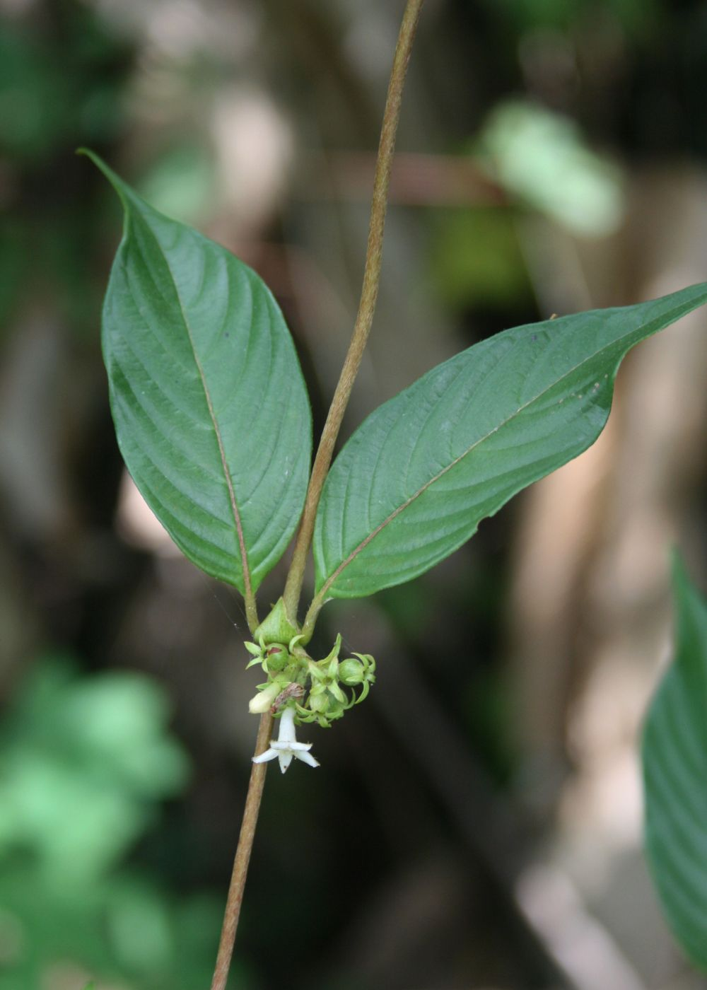 Sabicea panamensis, Kaffeegewächse (Rubiaceae) - Costa Rica: Prov. Puntarenas, La Gamba NW Golfito, "Laguna" zwischen "Tropenstation La Gamba"/"Estación Biológica La Gamba" und "Esquinas Rainforest Lodge"